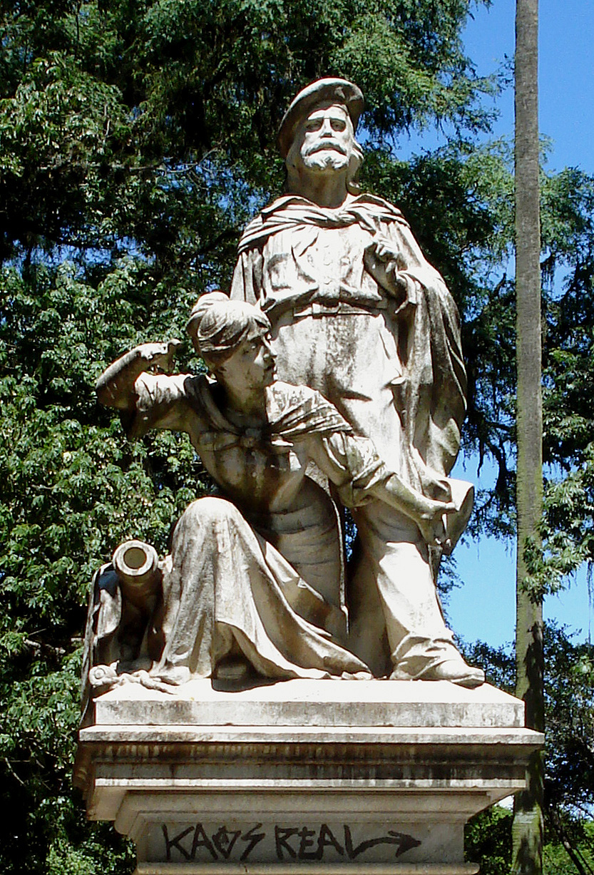 Monumento a Giuseppe Garibaldi e Anita Garibaldi, Praça Garibaldi, Porto Alegre, Brasil.